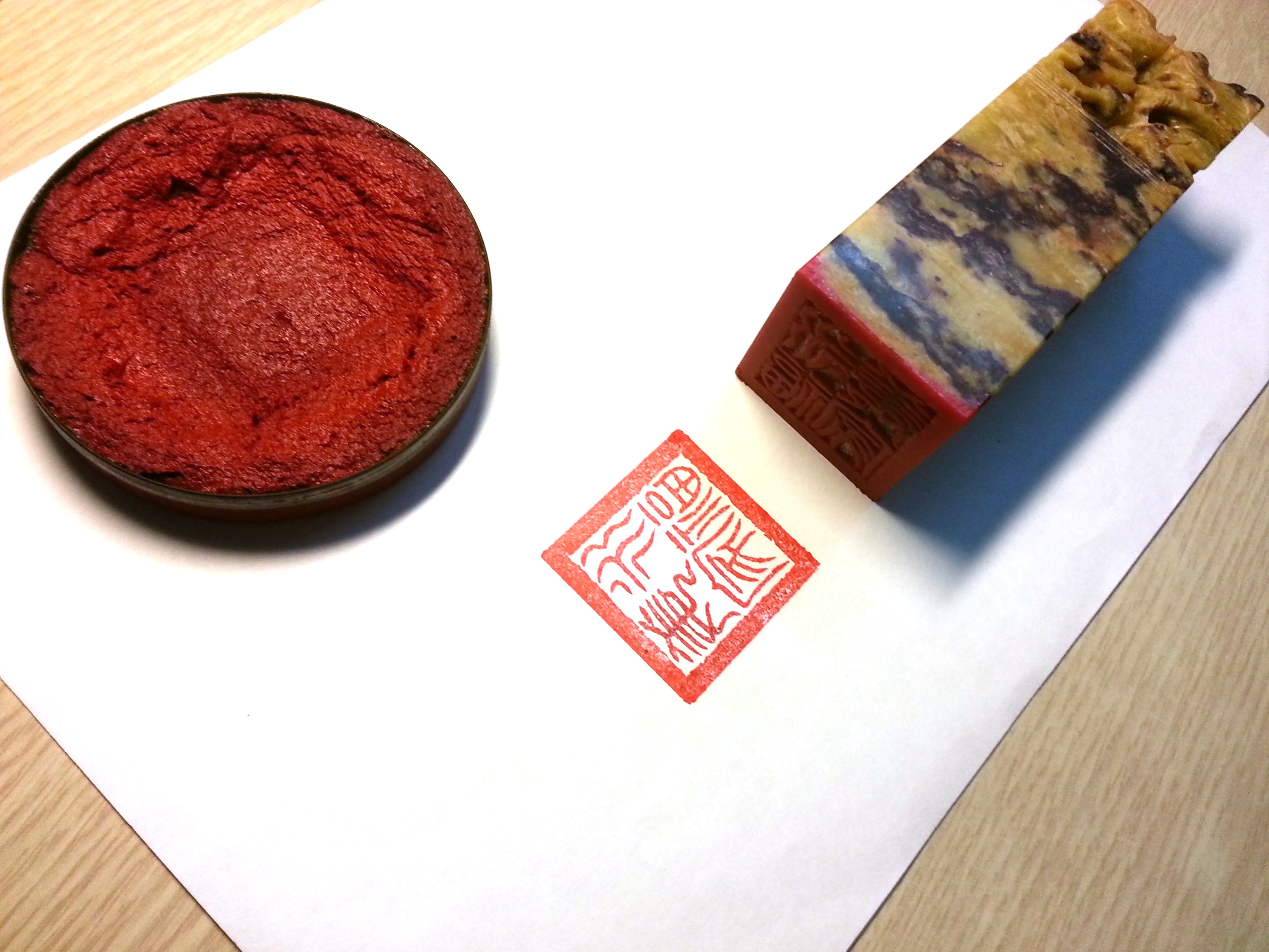 中文（台灣）: 永福姜家印